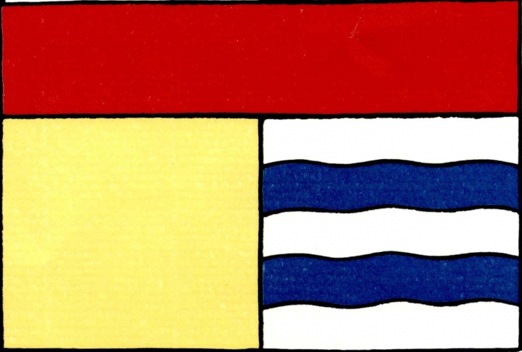 vlajka, Přívětice, okres Rokycany